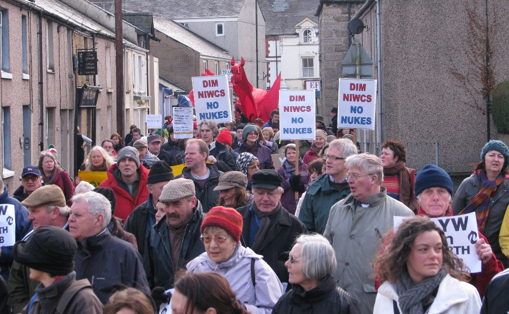 Protest mudiad PAWB (Pobl Atal Wylfa-B) i gefnogi teulu fferm Caerdegog.